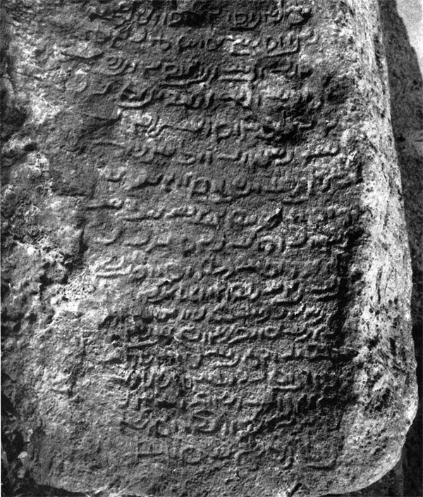 کتیبه سیوند